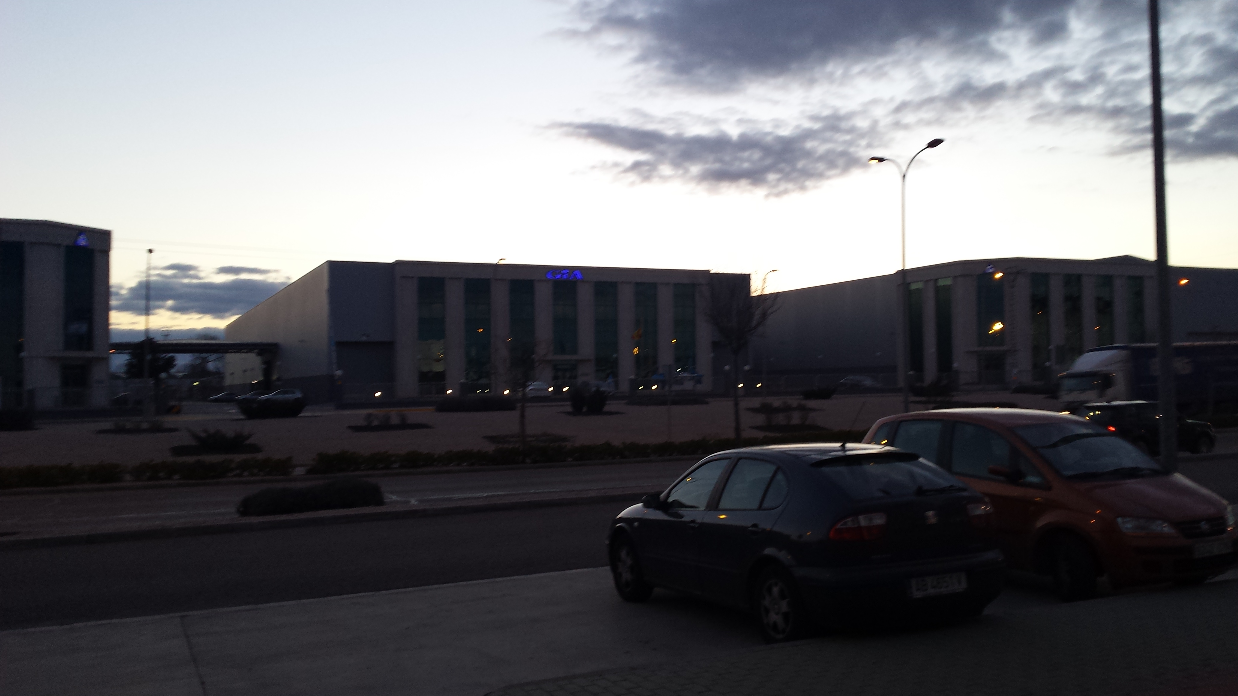 Gia Clecim Press. Avenida Gregorio Arcos. Parque Empresarial Campollano. Albacete